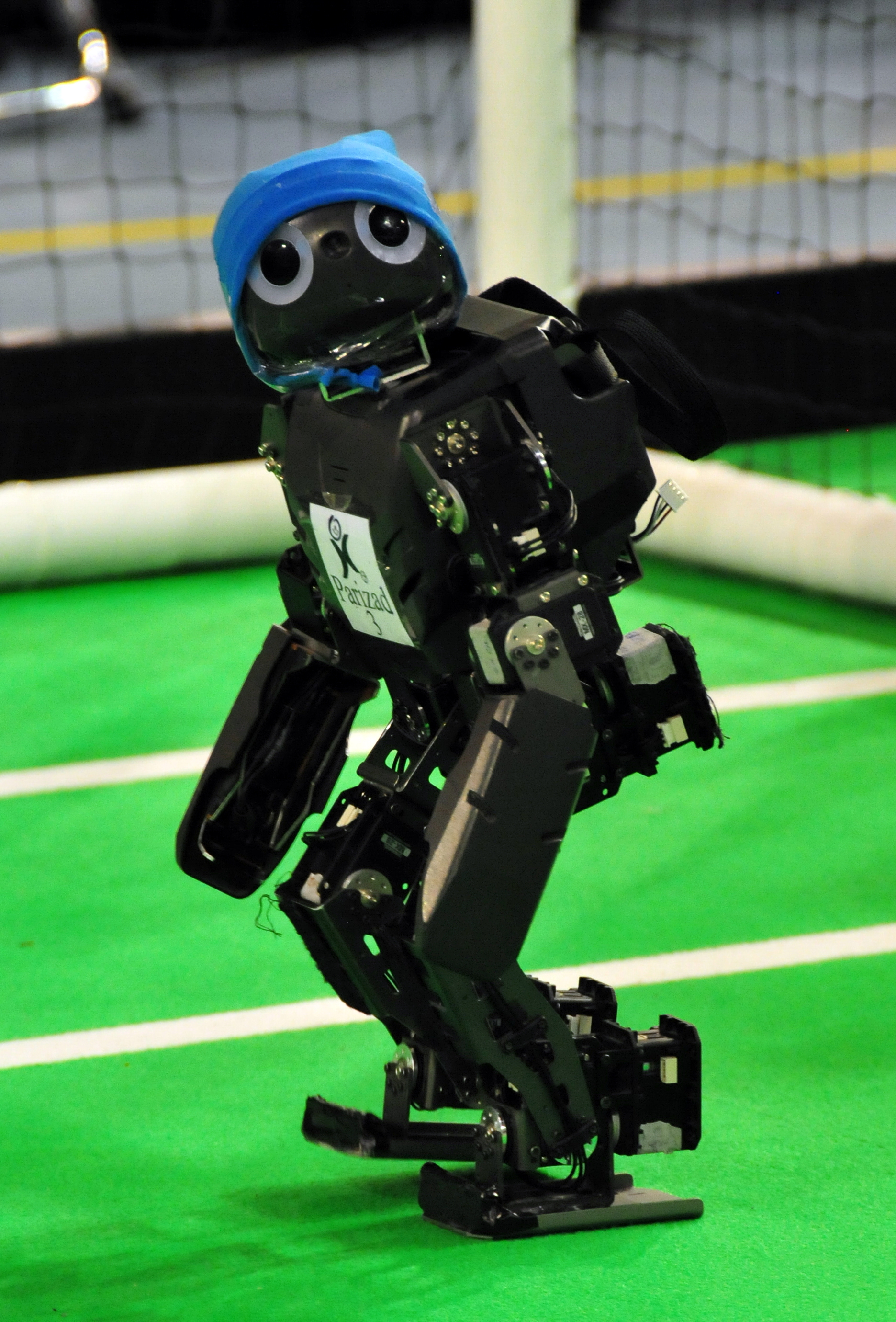 Eindhoven, Niederlande, Robocup 2013